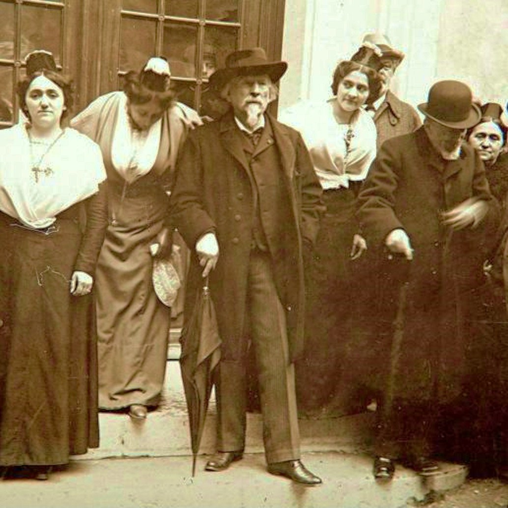 Frédéric Mistral et Arlésienes